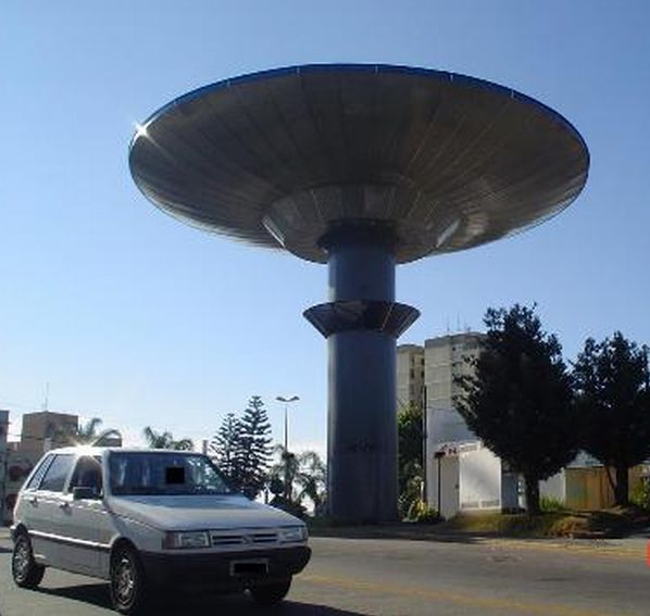 (portuguese) Caixa d´água em formato de disco voador na praça central de Varginha, MG, Brasil, lembra o incidente do ET de Varginha